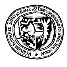 Logo Verband Deutscher Sinti und Roma e. V. - LV Schl.-Holst. bis 2011